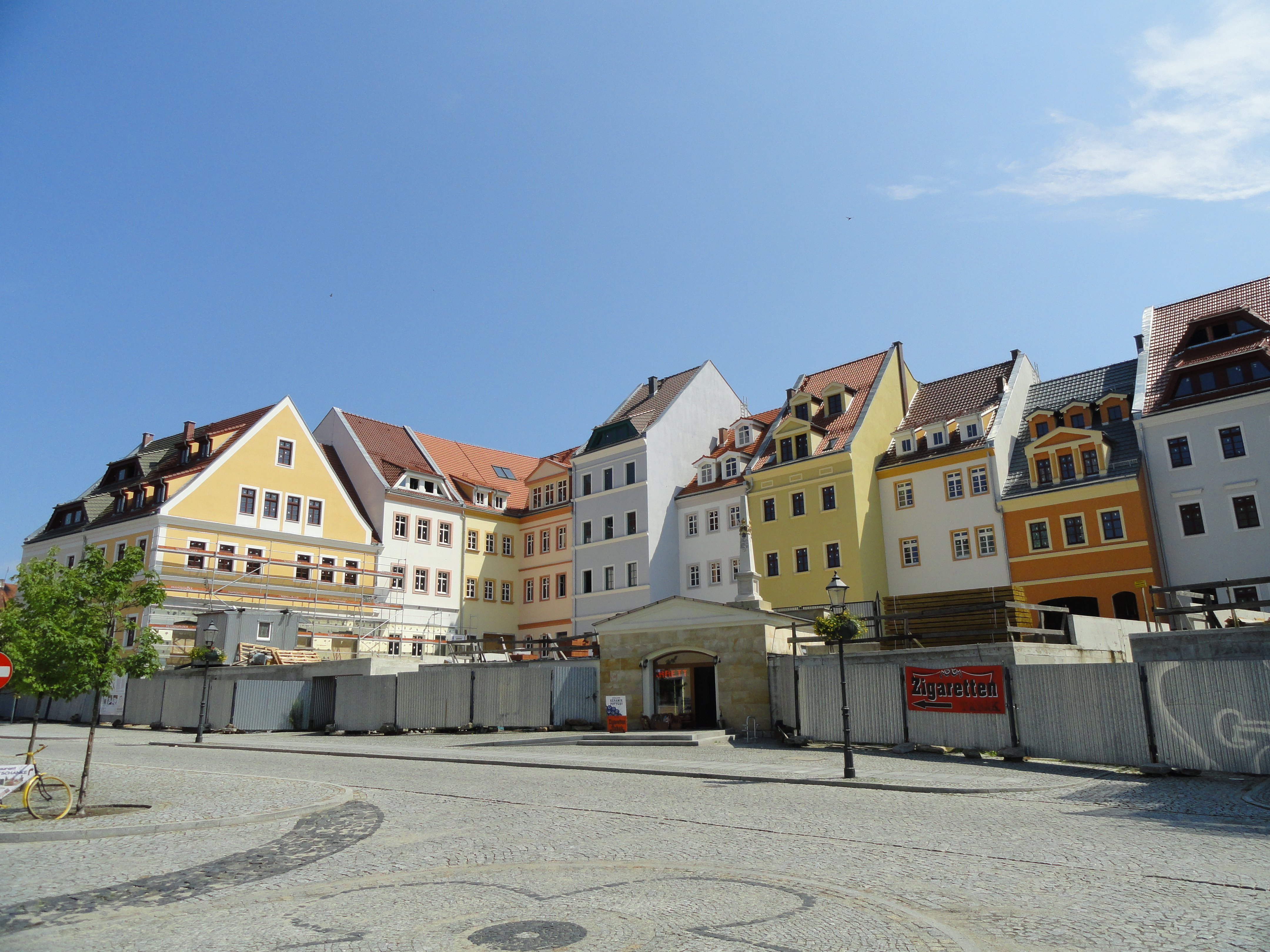 Der Zgorzelecer Postplatz (Plac Pocztowy) im Bauzustand im Juli 2012. Der Postplatz wird mit einem dem historischen Vorbild ähnlichen Gebäudeensemble bebaut.